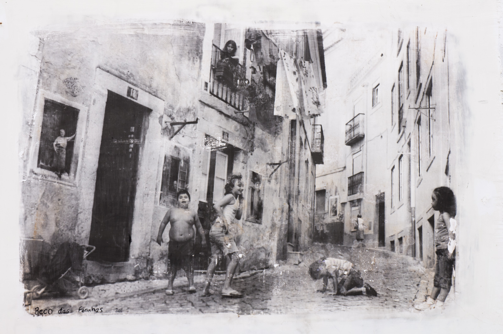 Trigueirinhas - 5